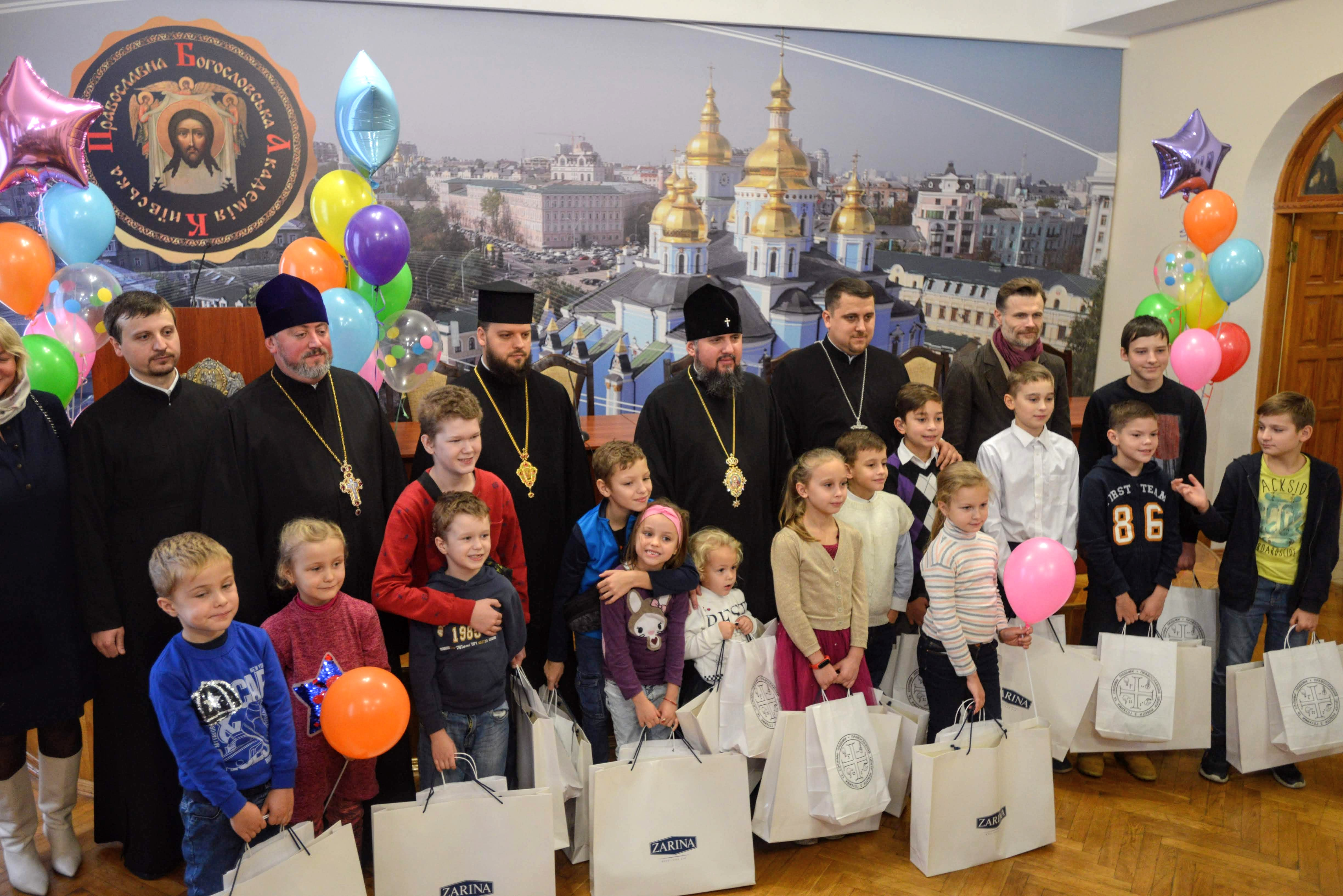 Митрополит Епіфаній на зустрічі із нечуючими дітьми